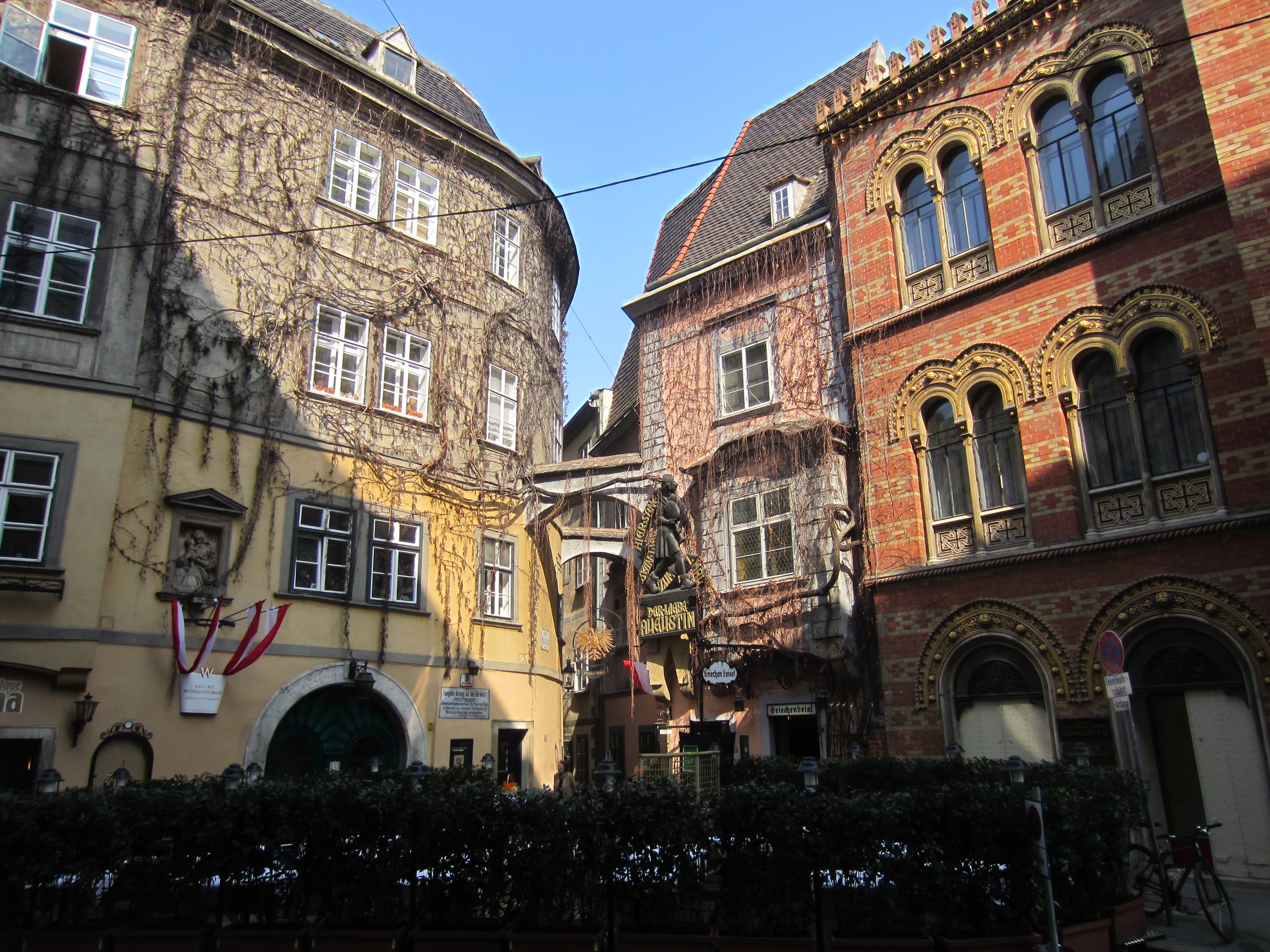 Wienes älteste Gaststätte, das "Griechenbeisl"